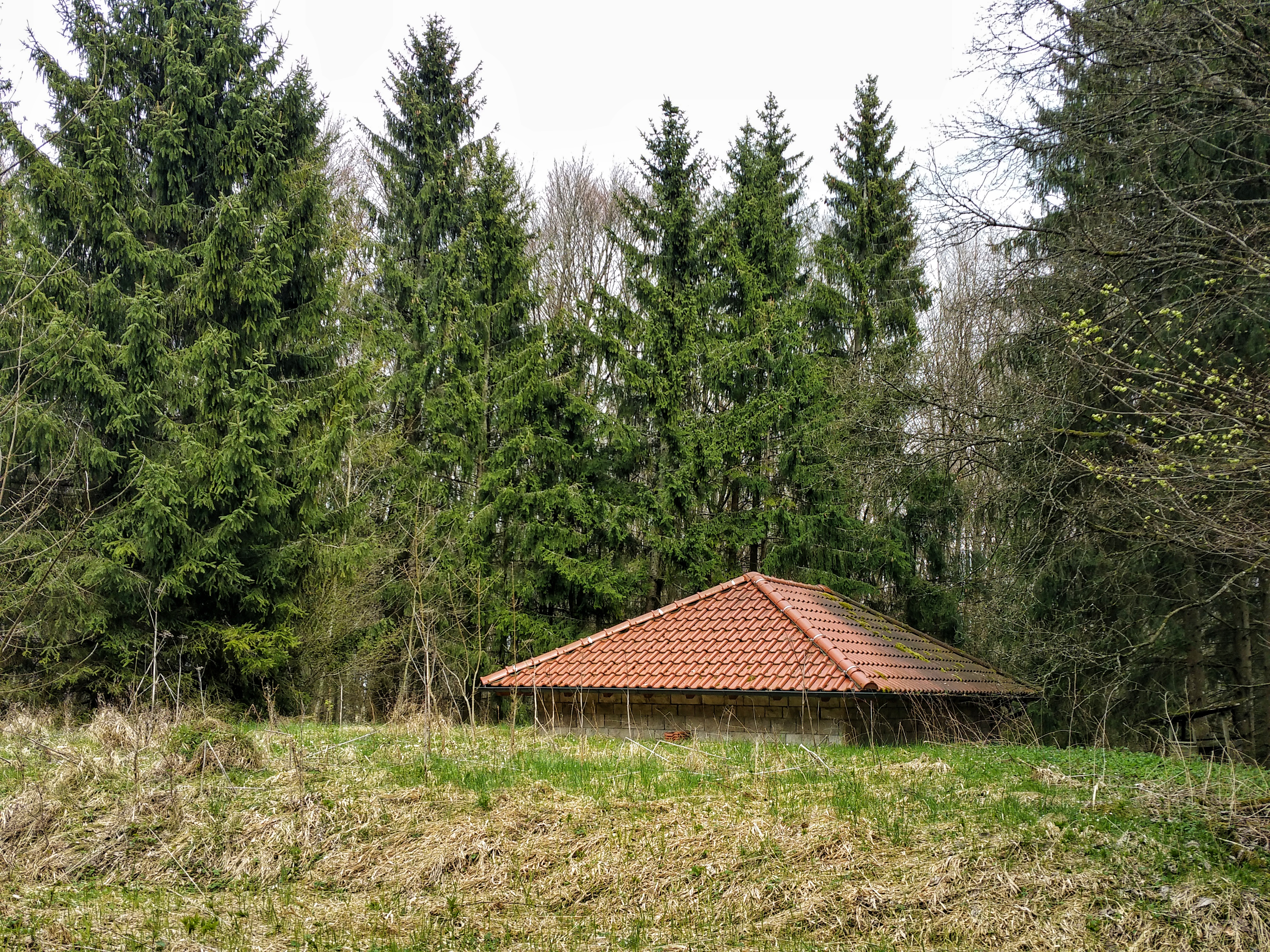 Rotreiß (Messpunkt Gipfel)